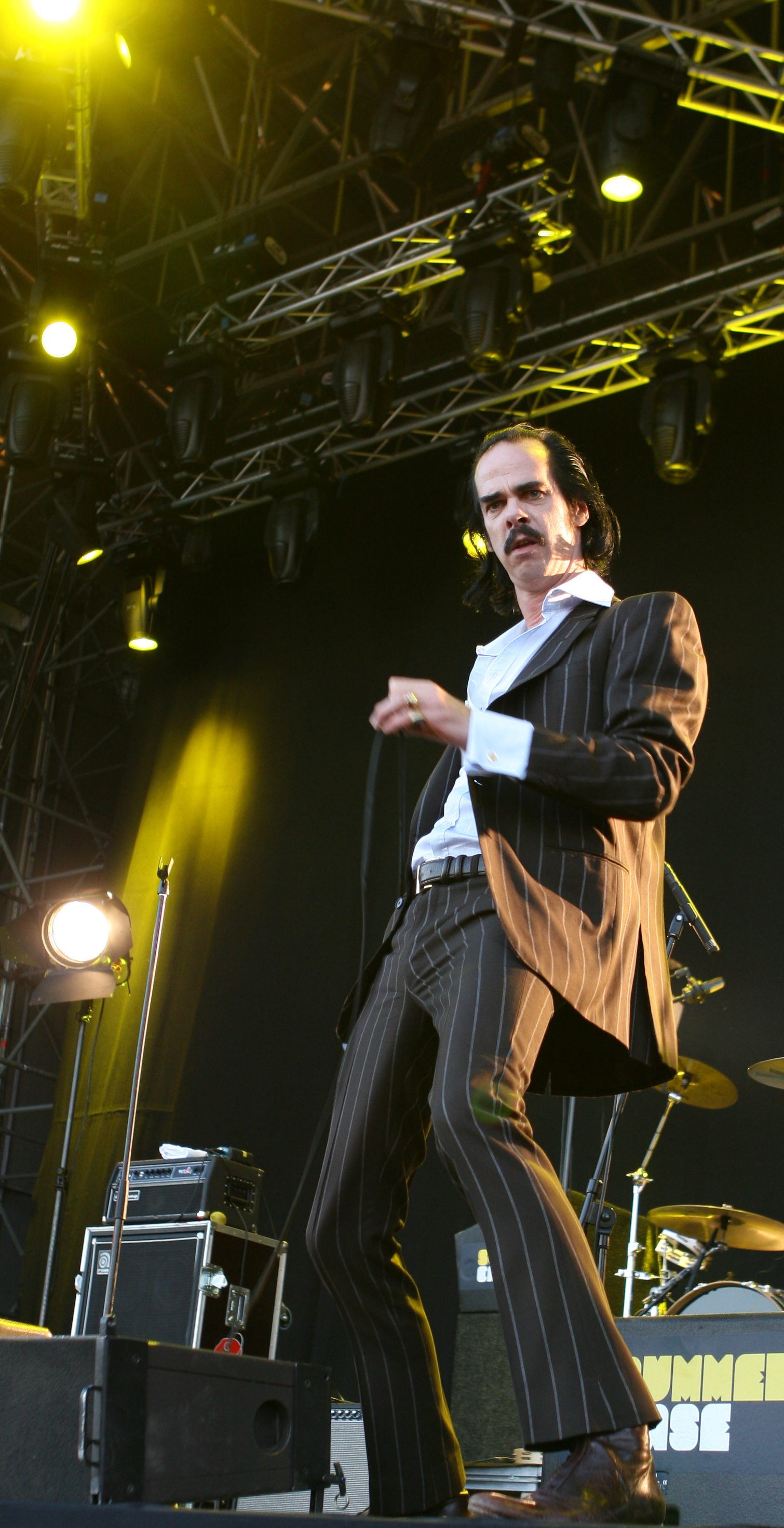 Nick Cave / Grinderman en el Summercase 08 de Barcelona